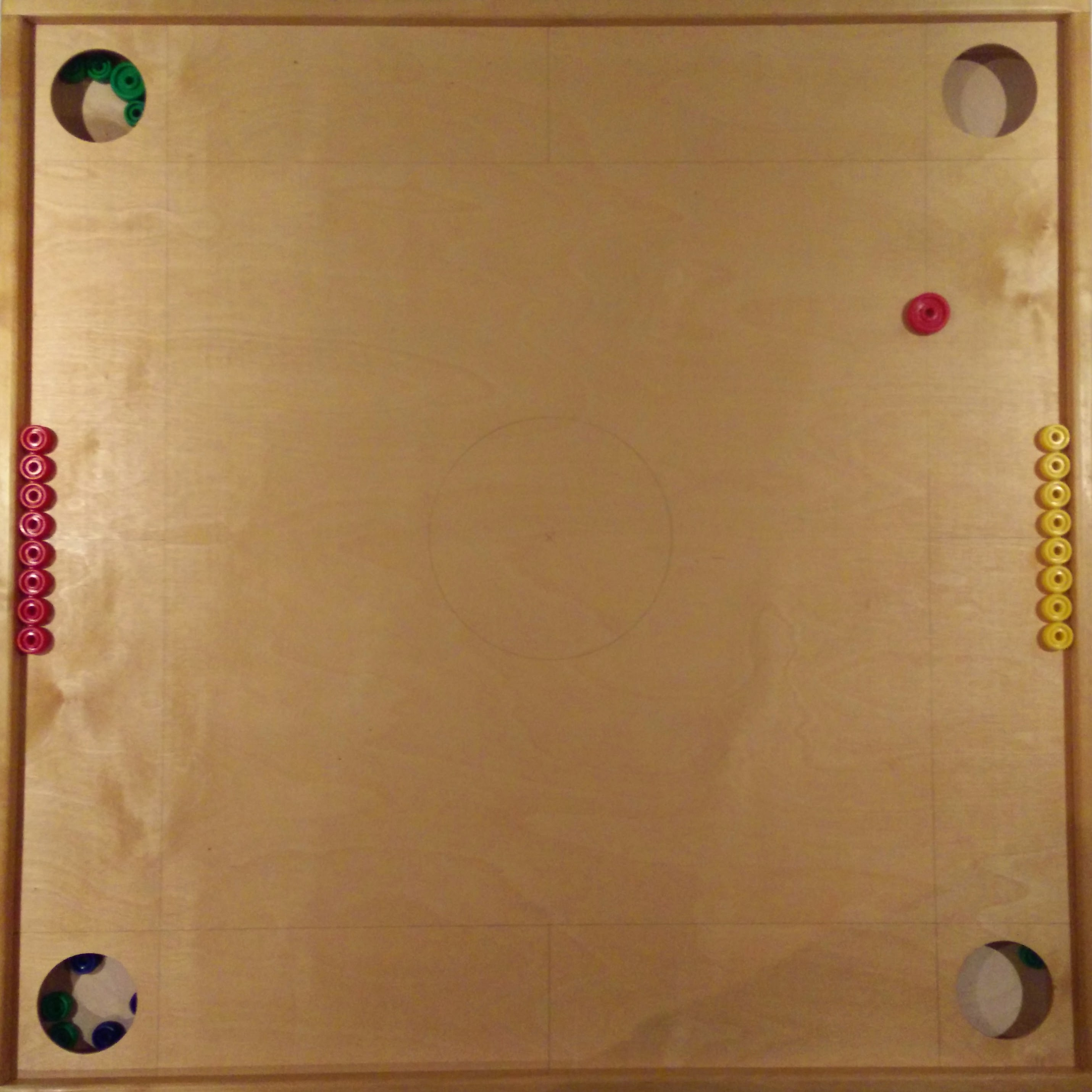 Koronan (peli) kaksinpelin aloitustilanne. Punainen pelaaja aloitusvuorossa.